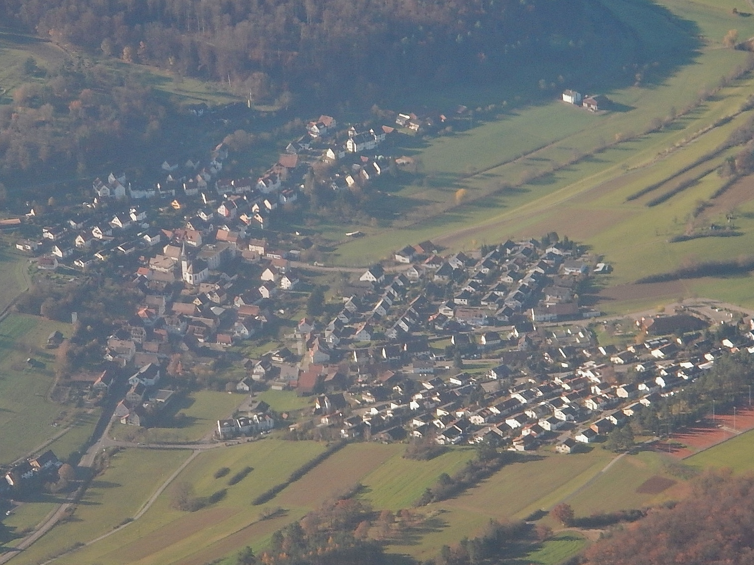 Dachtel